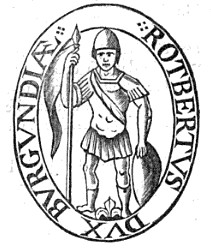 Robert Ier de France, dit le Vieux